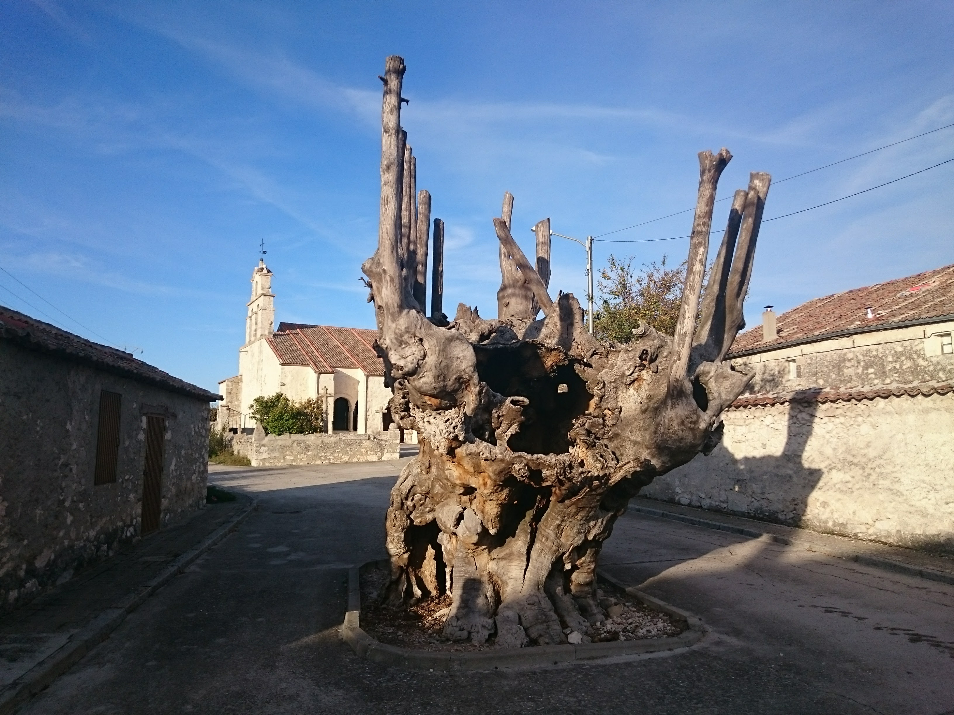 Vieja olma delante de la iglesia